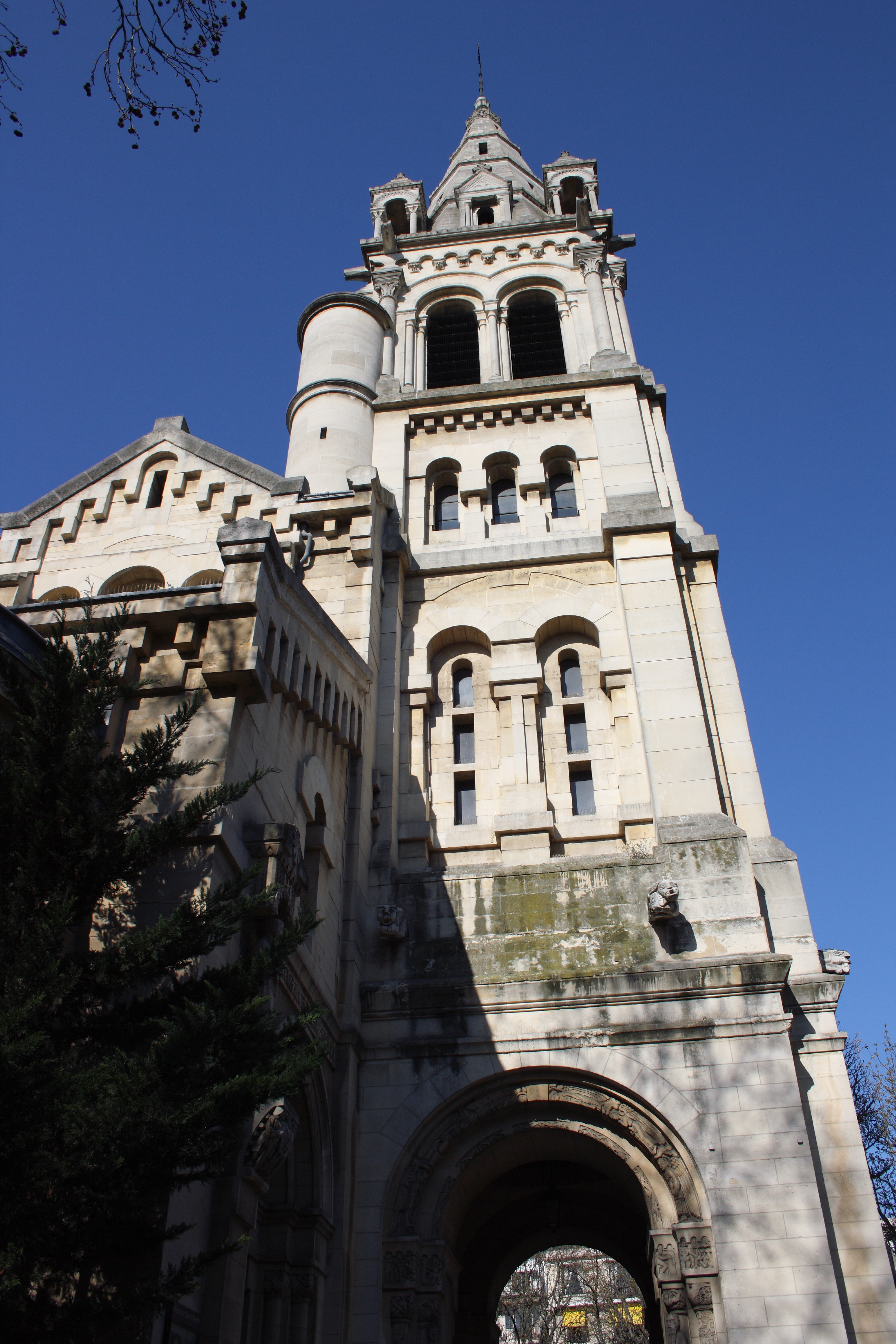 Turm der katholischen Pfarrkirche Saint-Pierre in Neuilly-sur-Seine